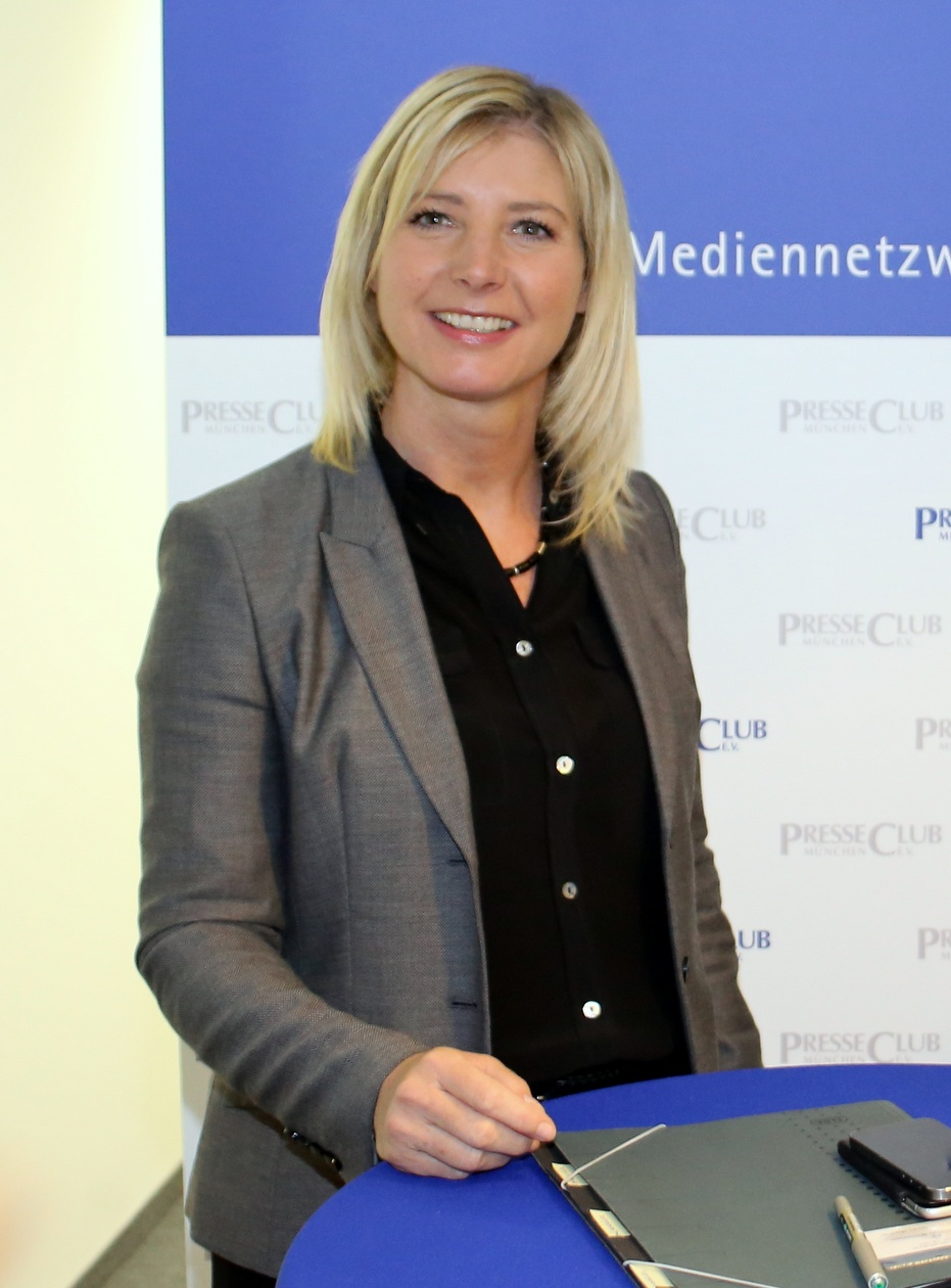 Ulrike Scharf, ist eine deutsche Politikerin (CSU), Mitglied des Bayerischen Landtags und Bayerische Staatsministerin für Umwelt und Verbraucherschutz. Hier am 9. März 2016 zu Besuch im Internationalen Münchner PresseClub. Titel des Werks: "Ulrike Scharf, CSU (2016)"